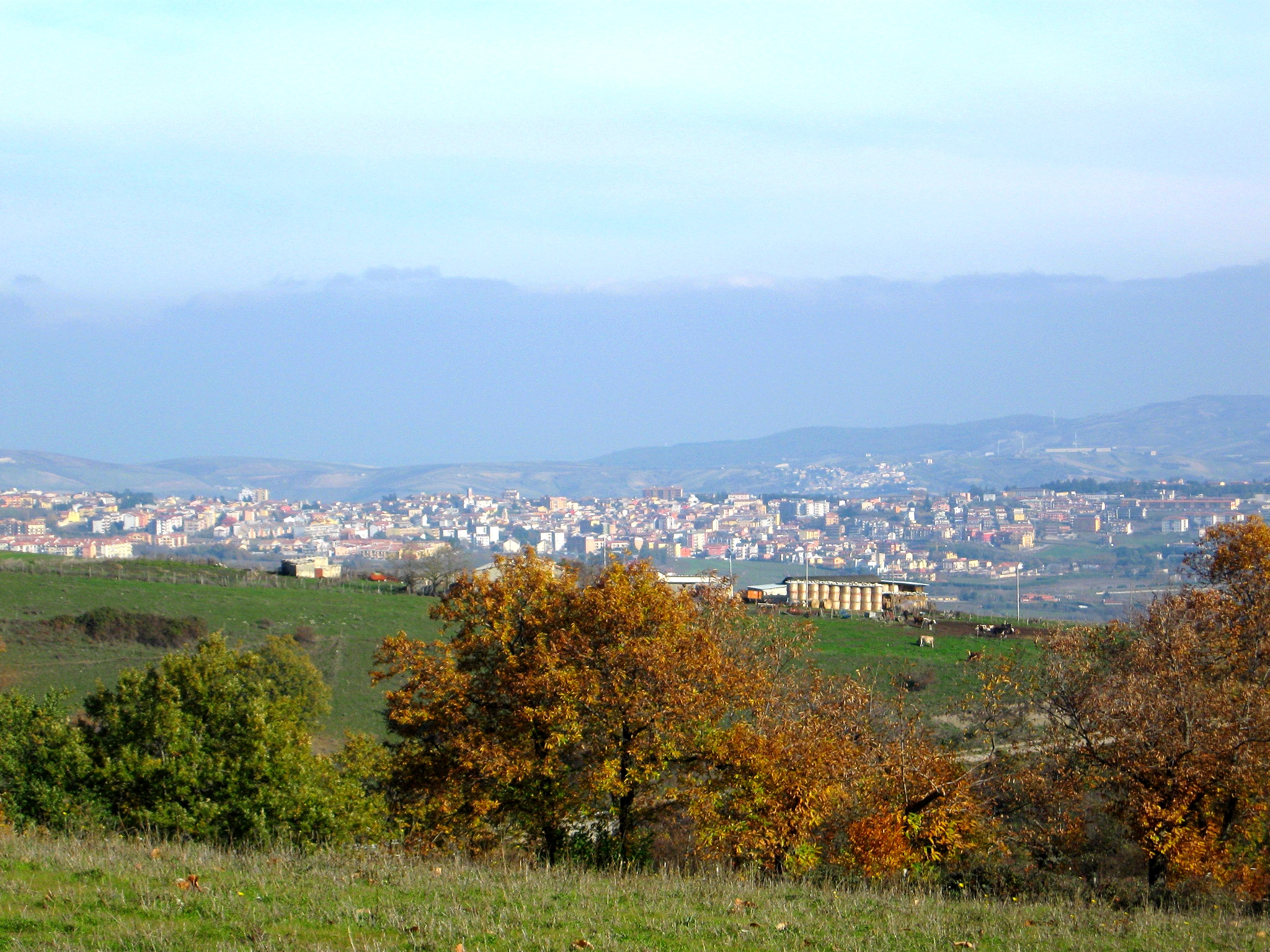 Panorama di Rionero in Vulture (Basilicata)